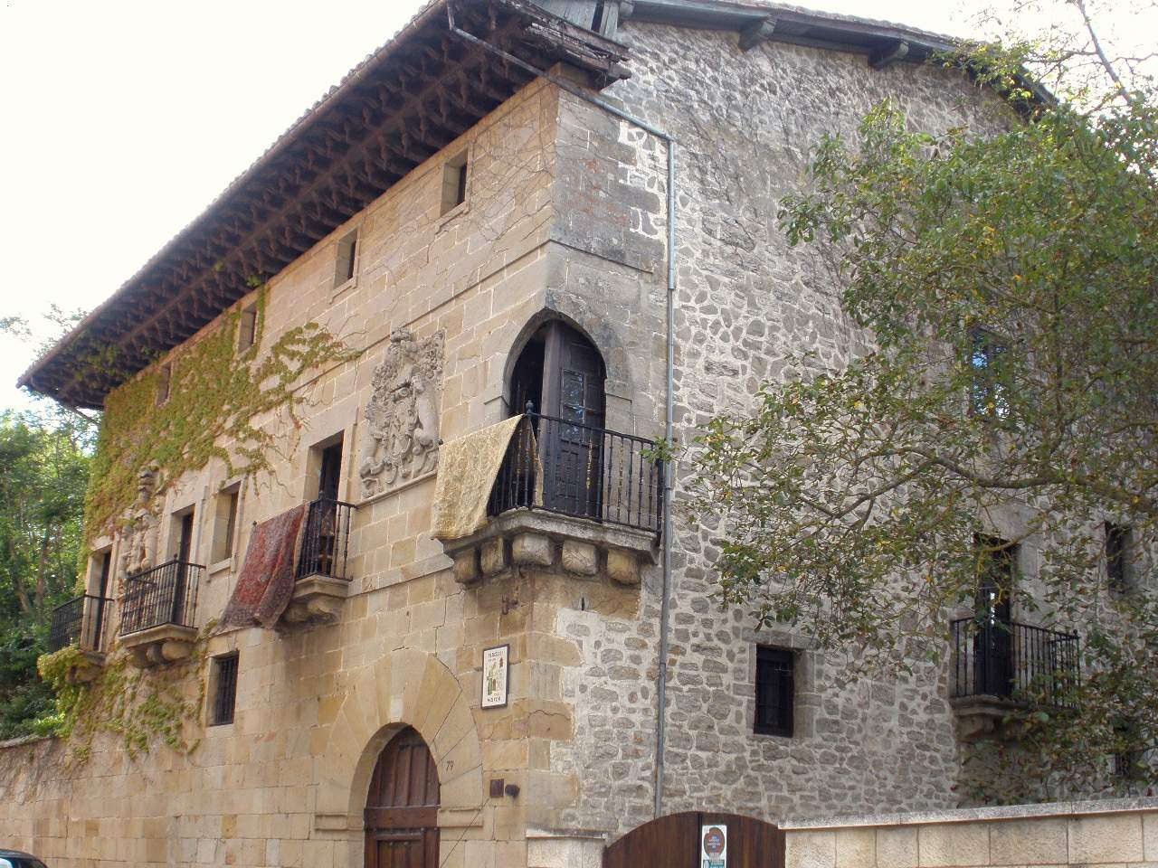 Casa Azkarraga, Salvatierra de Álava